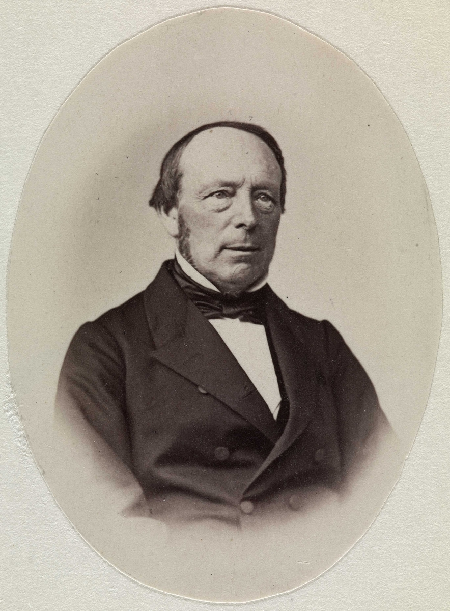 Peter Hersleb Graah Birkeland, portrett, mann, biskop, vignettert brystbilde.